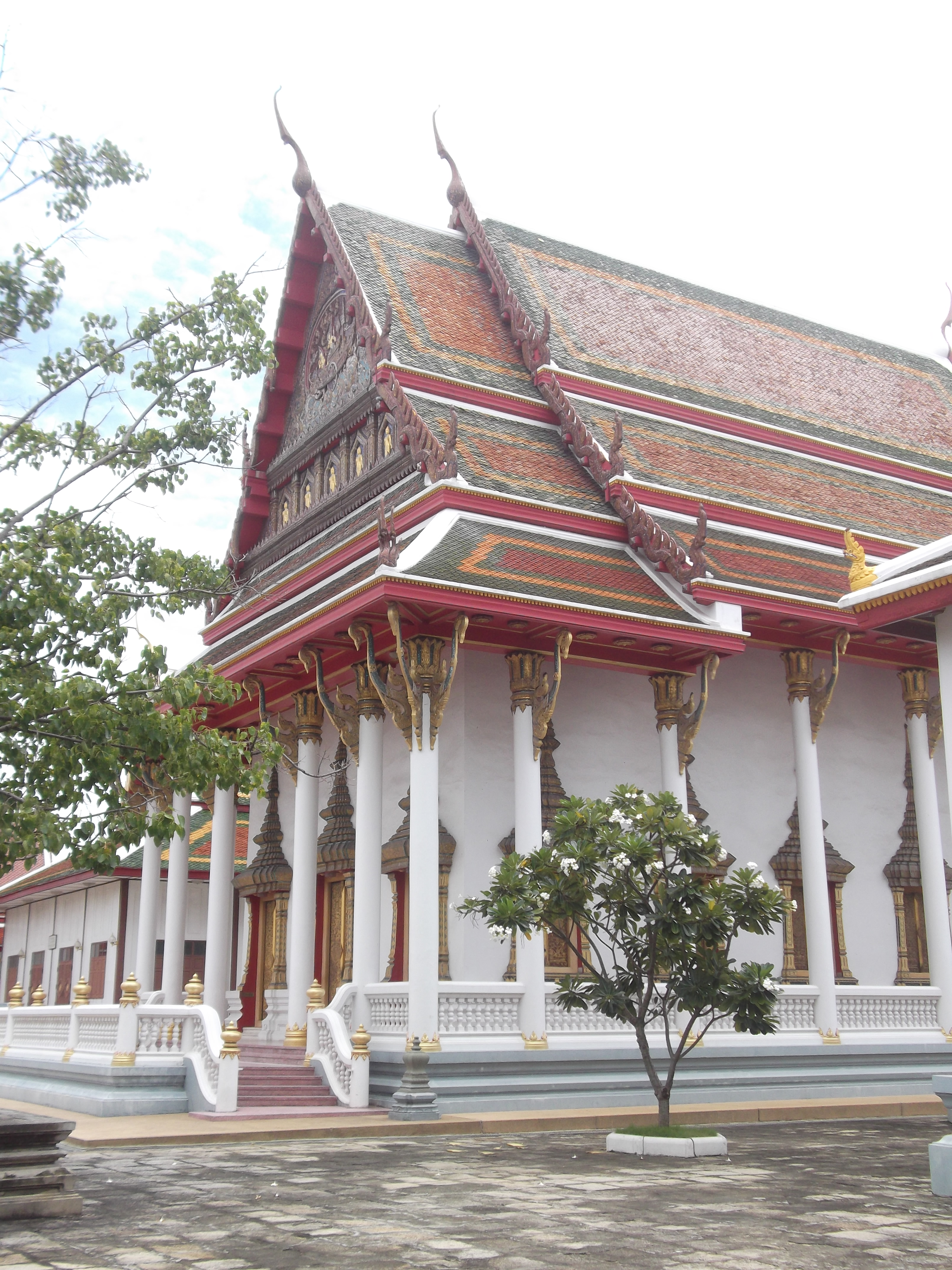 วัดบุปผาราม